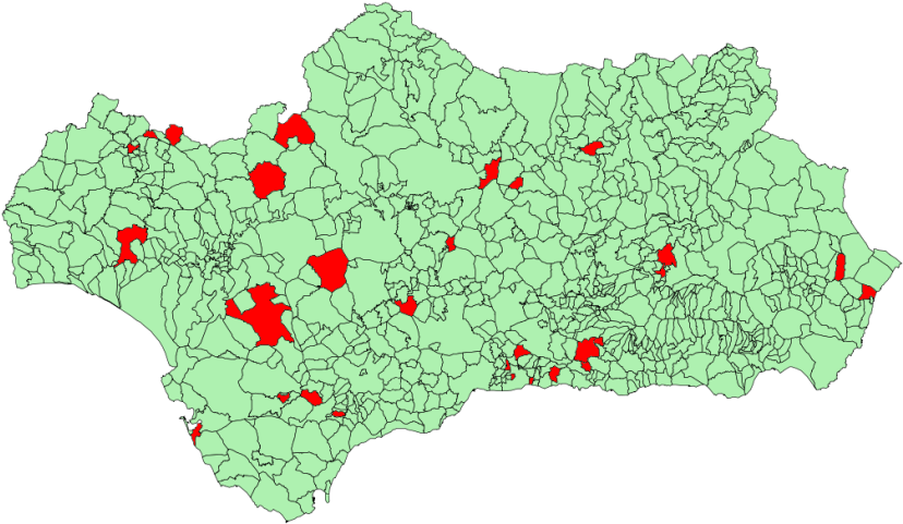 Municipios de Andalucía gobernados por el Partido Andalucista (PA), a fecha noviembre de 2009. En la provincia de Almería gobierna 2 de 102 municipios: Vera y Zurgena. En la provincia de Granada gobierna 5 de 168 municipios: Albuñuelas, Fonelas, Lentegí, Purullena y Villamena. En la provincia de Jaén gobierna 2 de 97 municipios: Higuera de Calatrava y Torreblascopedro. En la provincia de Málaga gobierna 7 de 101 municipios: Alcaucín, Algarrobo, Algatocín, Benamargosa, Benamocarra, Frigiliana y Sierra de Yeguas. En la provincia de Córdoba gobierna 2 de 75 municipios: Cañete de las Torres y Monturque. En la provincia de Cádiz gobierna 3 de 44 municipios: Algar, Ubrique y San Fernando. En la provincia de Sevilla gobierna 4 de 105 municipios: Alanís, Marchena, El Pedroso y Utrera. En la provincia de Huelva gobierna 4 de 79 municipios: Arroyomolinos de León, Galaroza, Hinojales y Niebla.